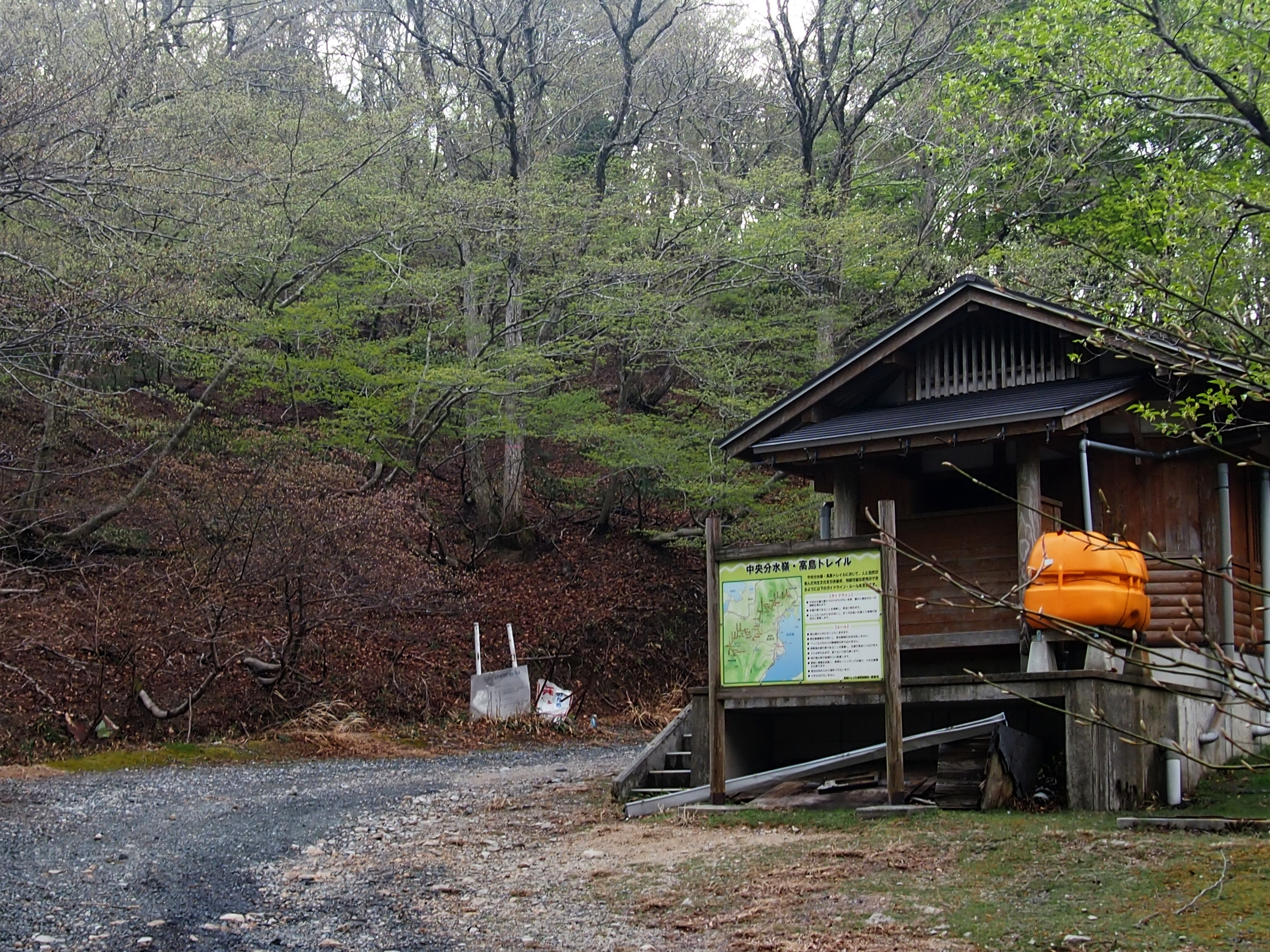 滋賀県高島市と福井県敦賀市を分ける黒河峠